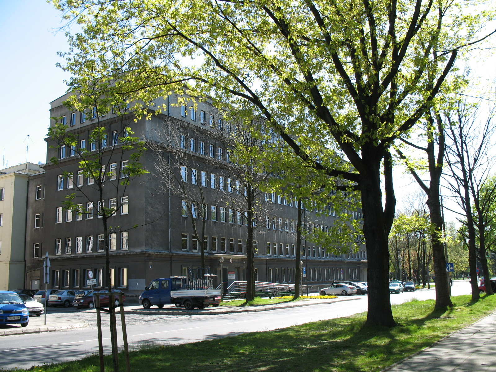 Rada Dzielnicowa w Nowej Hucie.